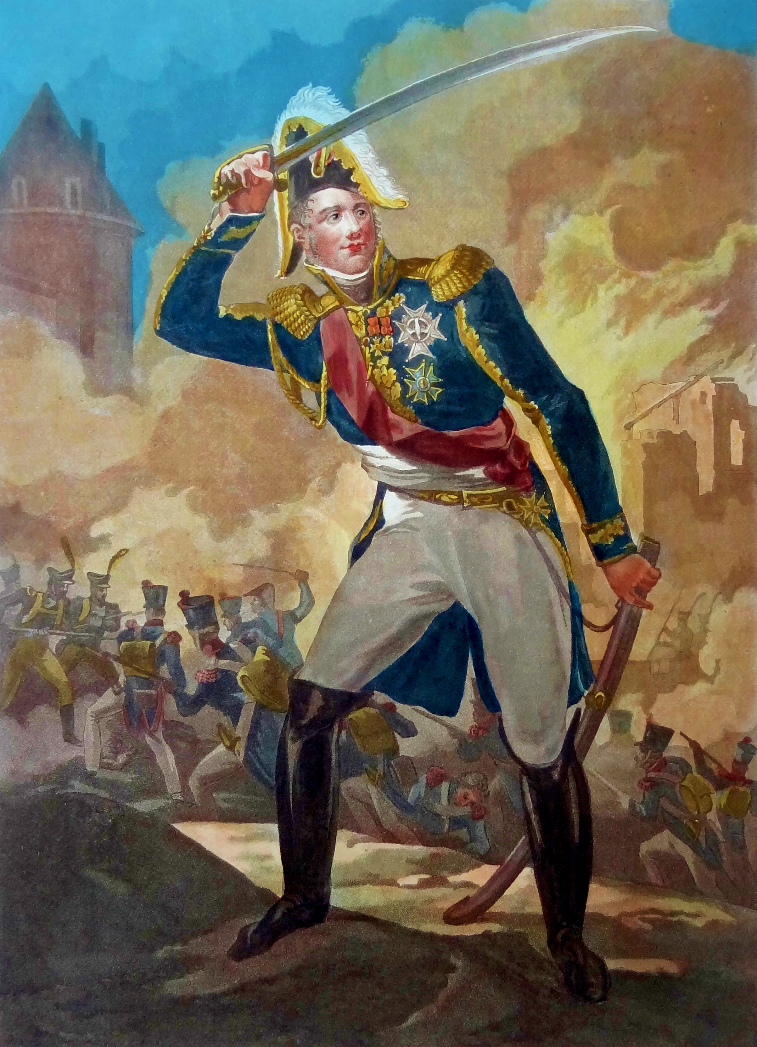 Claude-Victor Perrin (1764-1841), maréchal de l'Empire et duc de Bellune.